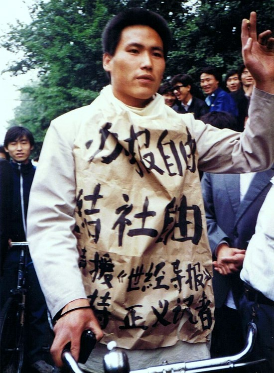 1989年5月10日浦志强在北京游行争取言论自由。（圖中為浦志强1989年5月10日在北京游行时所拍摄。） 來源： 攝影師：蔡淑芳@sfchoi8964 版權持有: 蔡淑芳@sfchoi8964/Getty Images （1989年5月10日） 版权声明：